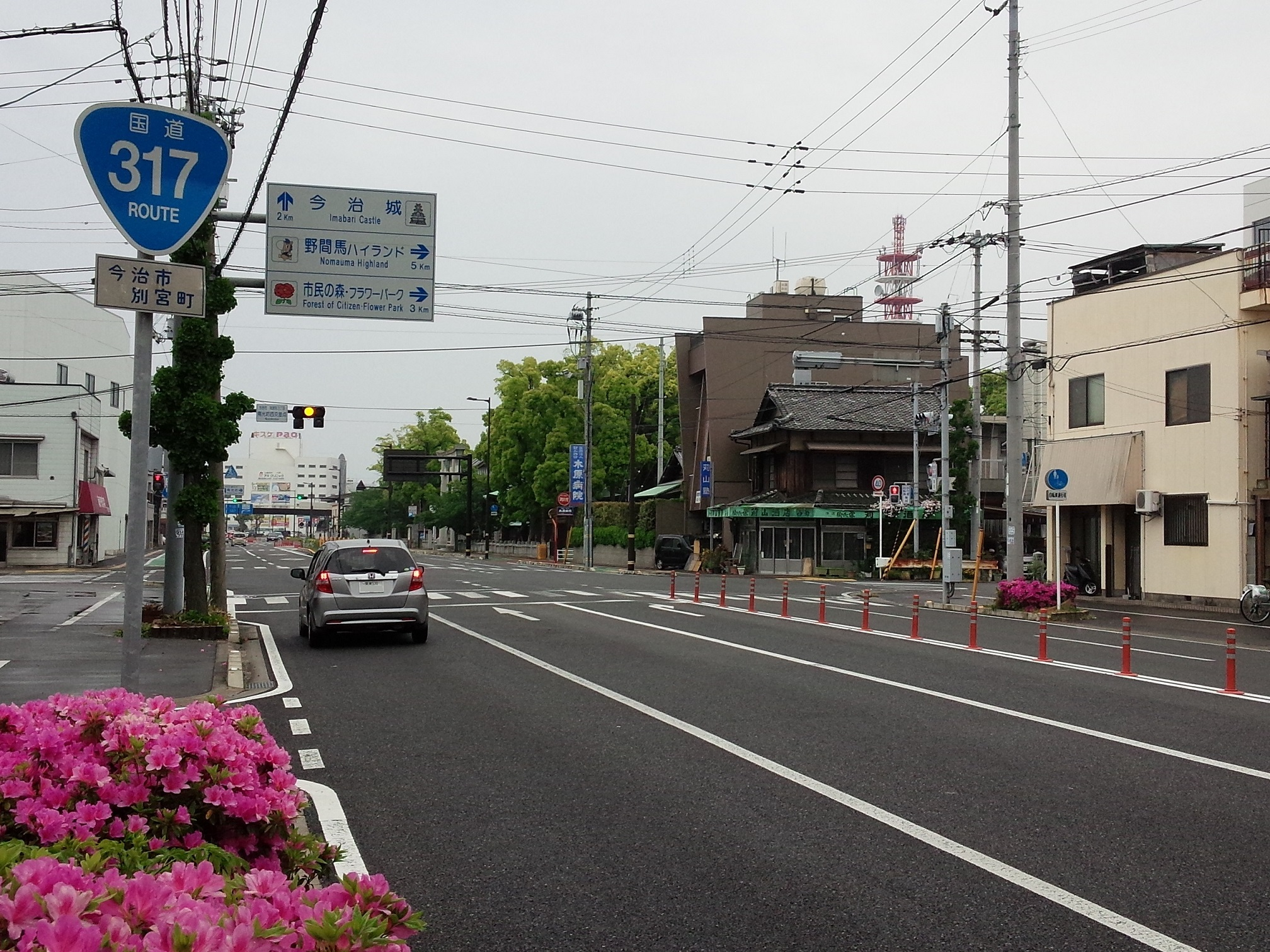 今治市別宮町付近の国道317号。